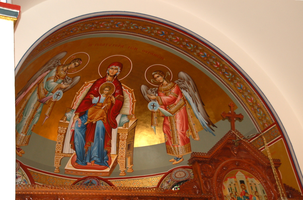 Apsis der griechisch-orthodoxen St. Nektarios-Kirche in Neuss-Weckhoven